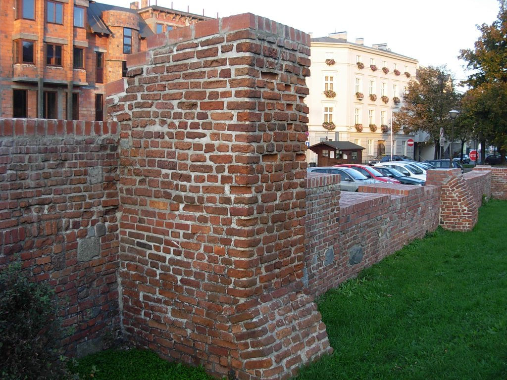 Resztki murów miejskich w Bydgoszczy (XV-XVI w.)